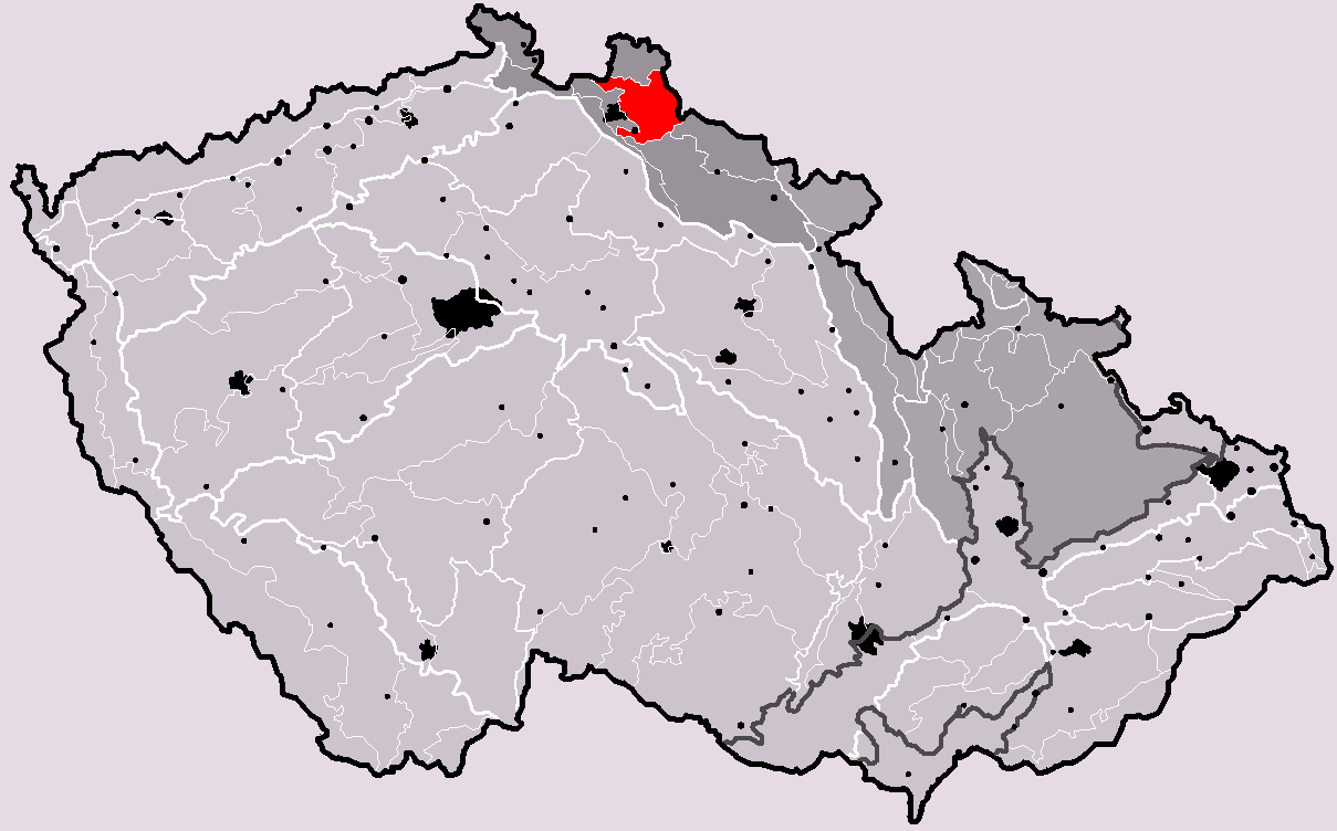 Poloha geomorfologického celku Jizerské hory v rámci České republiky. Hercynský systém Hercynská pohoří I Česká vysočina I4 (IV) Krkonošsko-jesenická subprovincie I4A (IVA) Krkonošská oblast I4A-6 (IVA-6) Jizerské hory